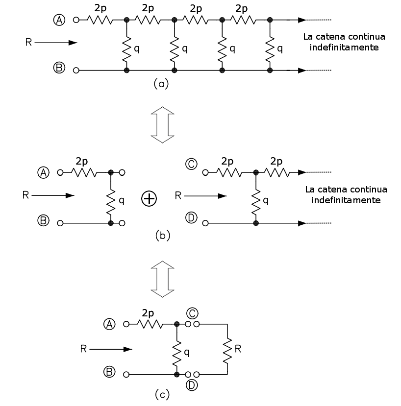 La figura spiega come ottenere il valore della resistenza equivalente in una catena infinita di resistori disposti come riportato nella figura stessa.